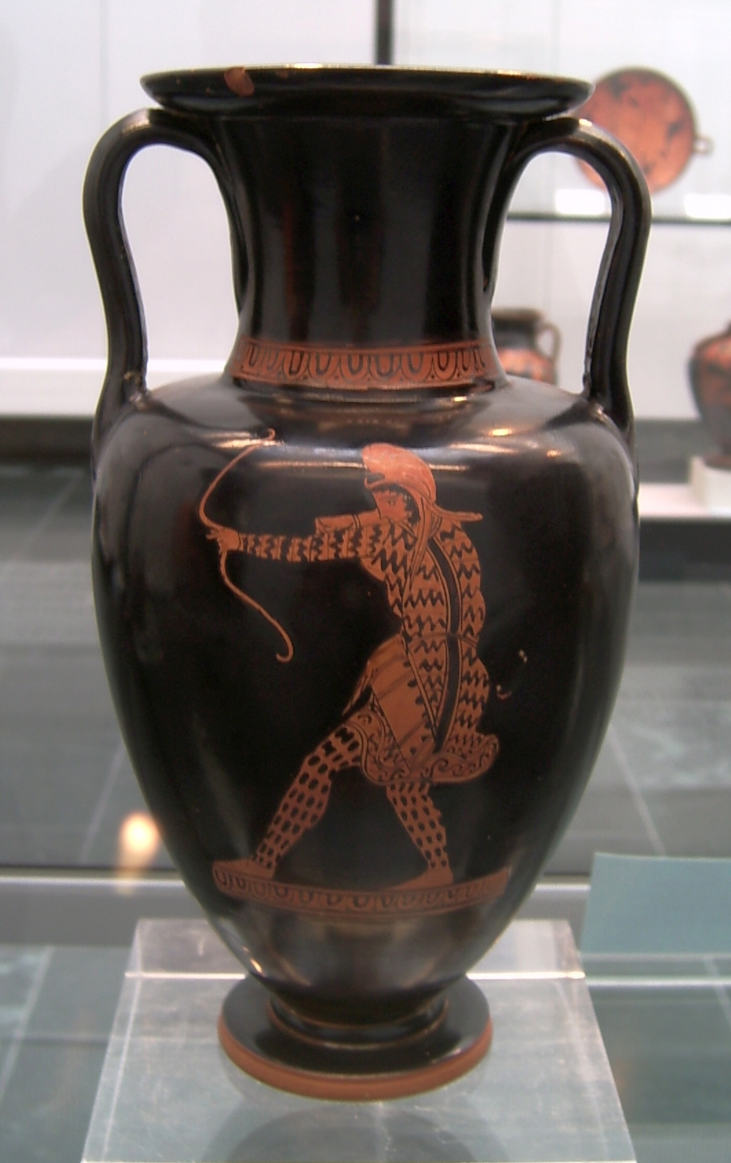 Attisch-rotfigurige Nolanische Amphora mit der Darstellung einer reitenden Amazone in orientalischer Tracht auf der Vorderseite und einer Bogenschießenden Amphora in orientalischer Tracht auf der Rückseite, um 430 v. Chr, gefunden in Agrigent, Staatliche Antikensammlungen, Inventarnummer 2342